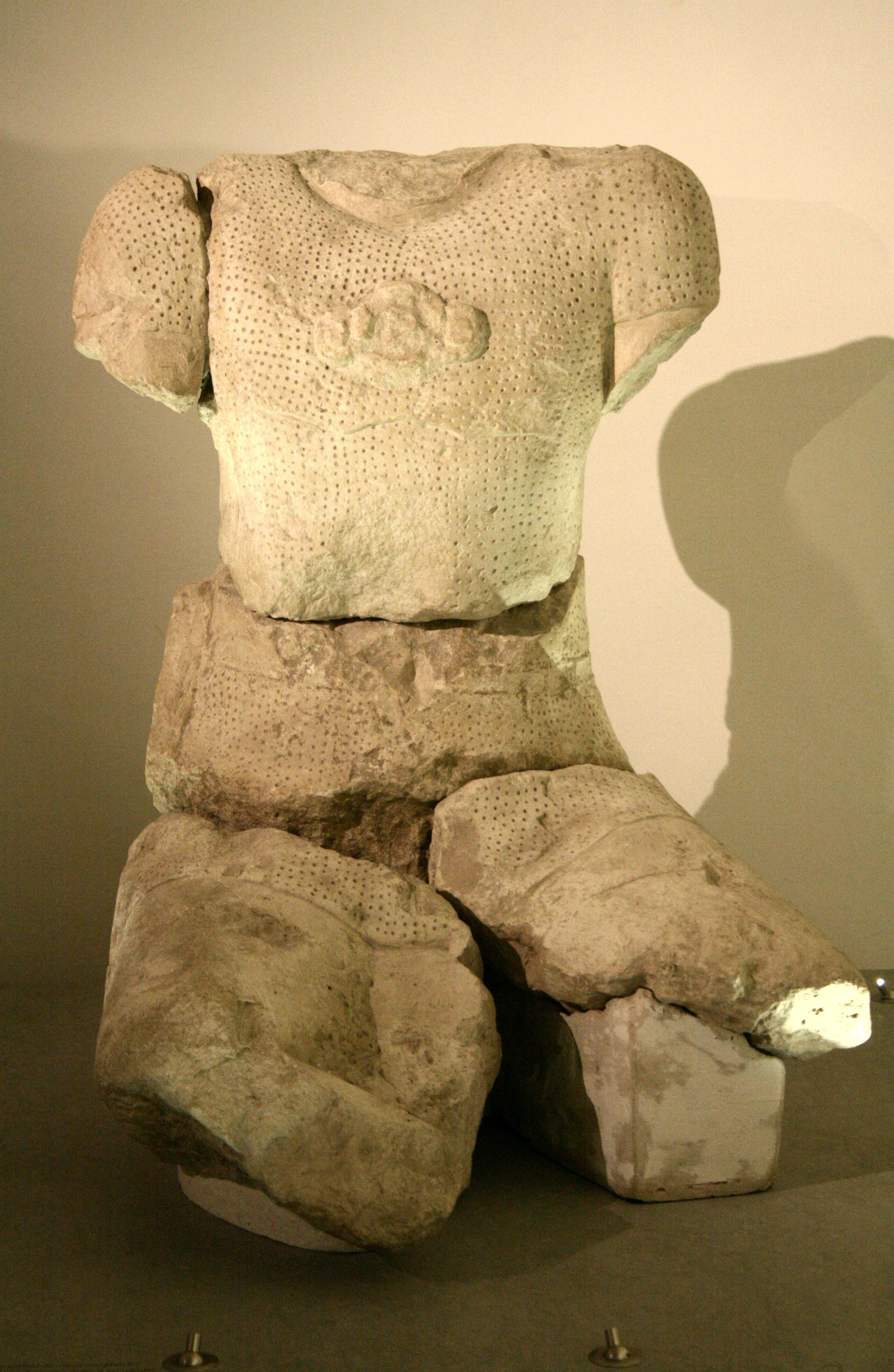 Guerrier accroupi provenant du site de l'oppidum d'Entremont, département des Bouches-du-Rhône (France), conservées au Musée Granet à Aix-en-Provence